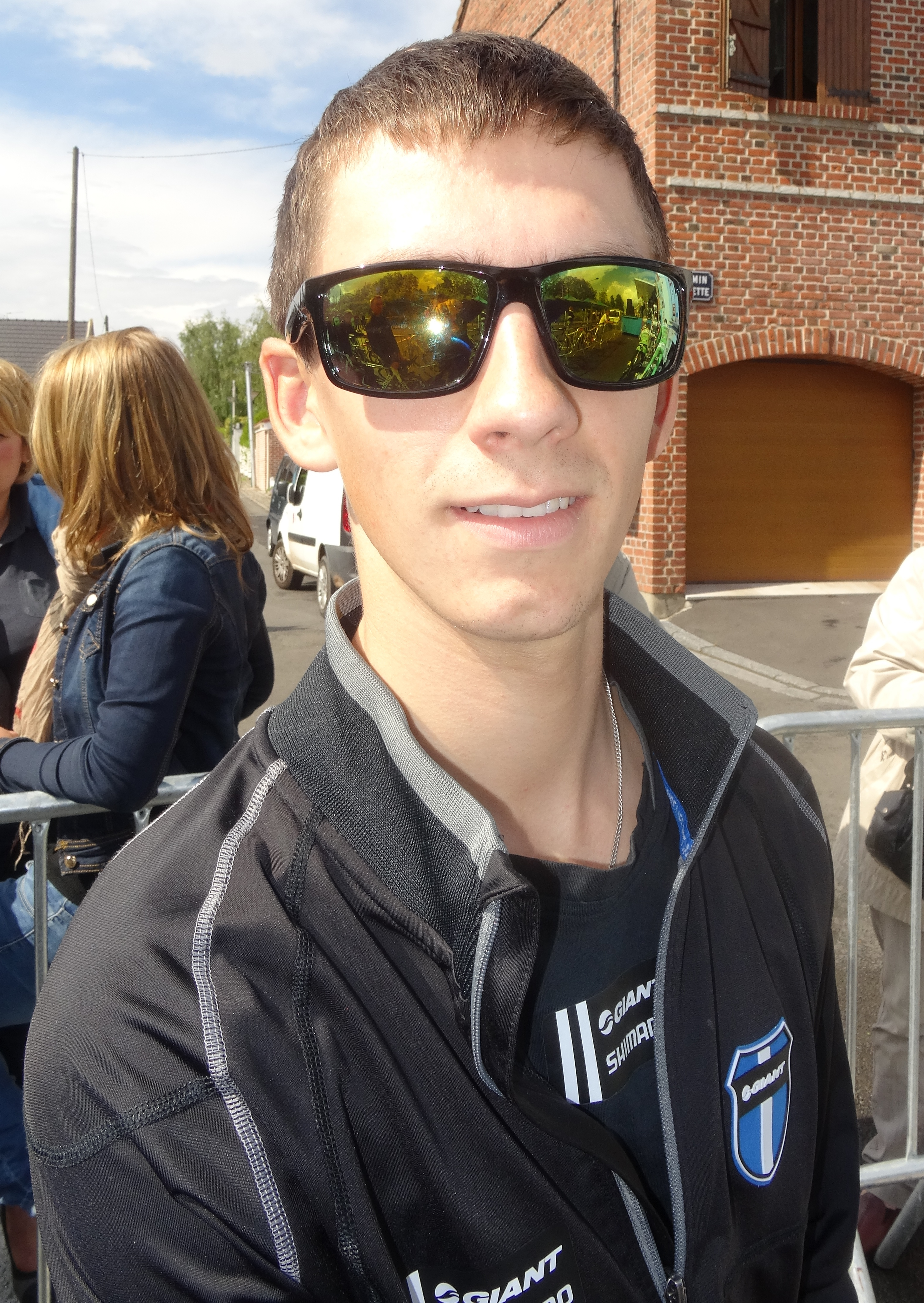 Reportage photographique réalisé le vendredi 23 mai 2014 à l'occasion du départ de la première étape du Paris-Arras Tour 2014 à Lens, Pas-de-Calais, Nord-Pas-de-Calais, France. Depicted person: Lars van der Haar